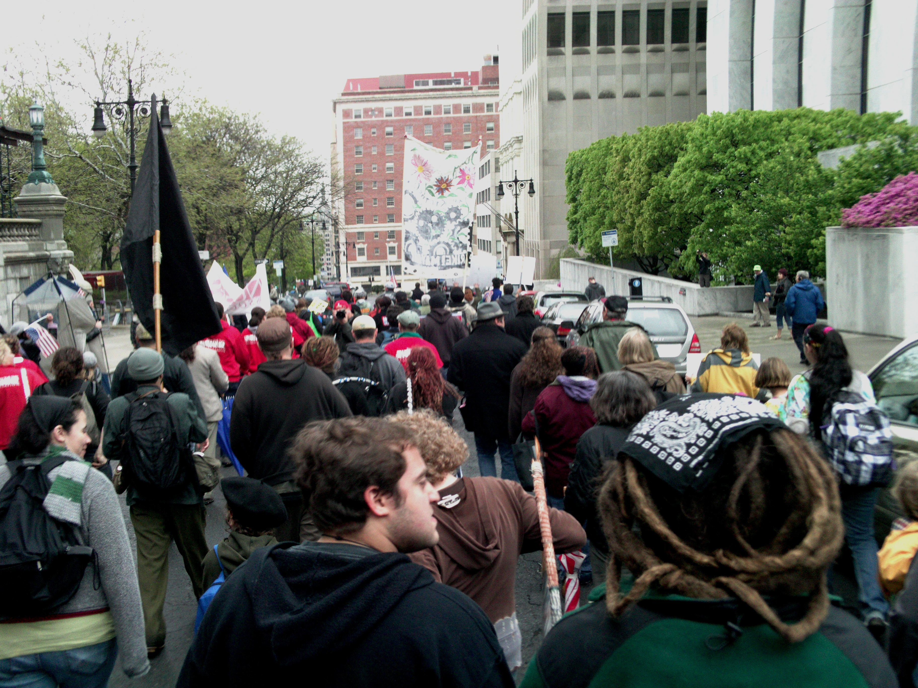 Occupy Albany May Day Rally